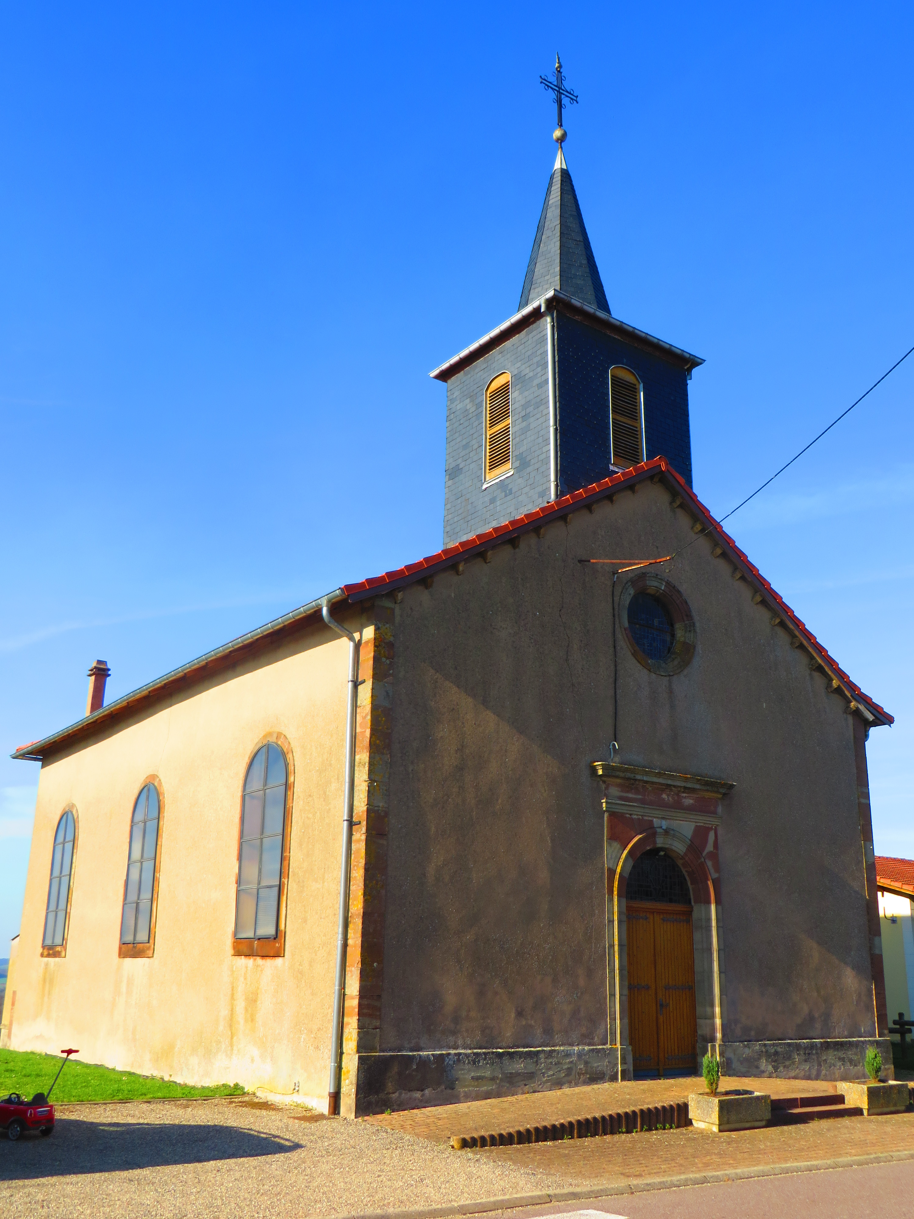 Montdidier Église Saint-Hubert